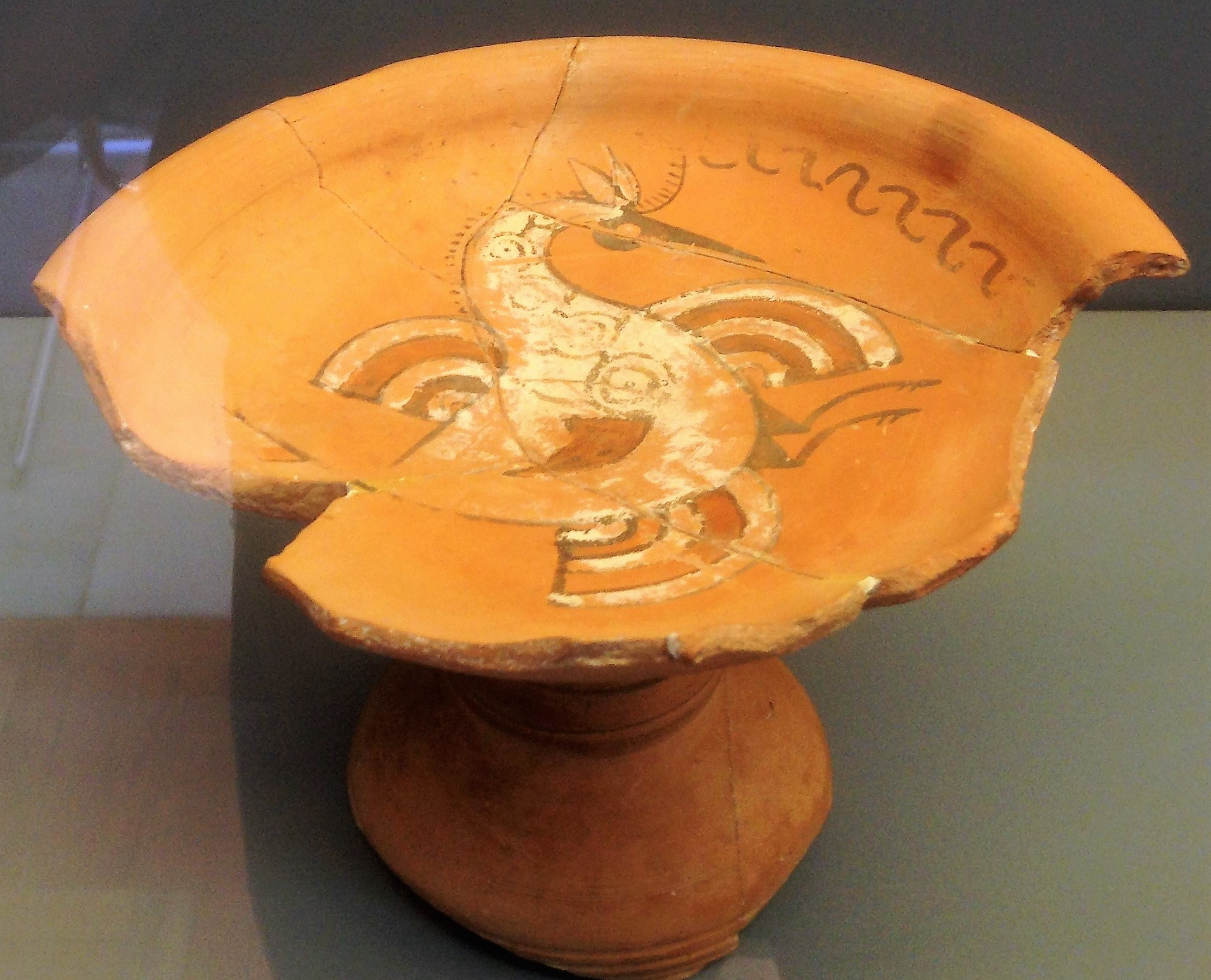 Simula movimiento de la abubilla, enlazando el mundo de los vivos con la divinidad en la figura que simula el vuelo del trisquel celta. Se encuentra en el Museo Numantino